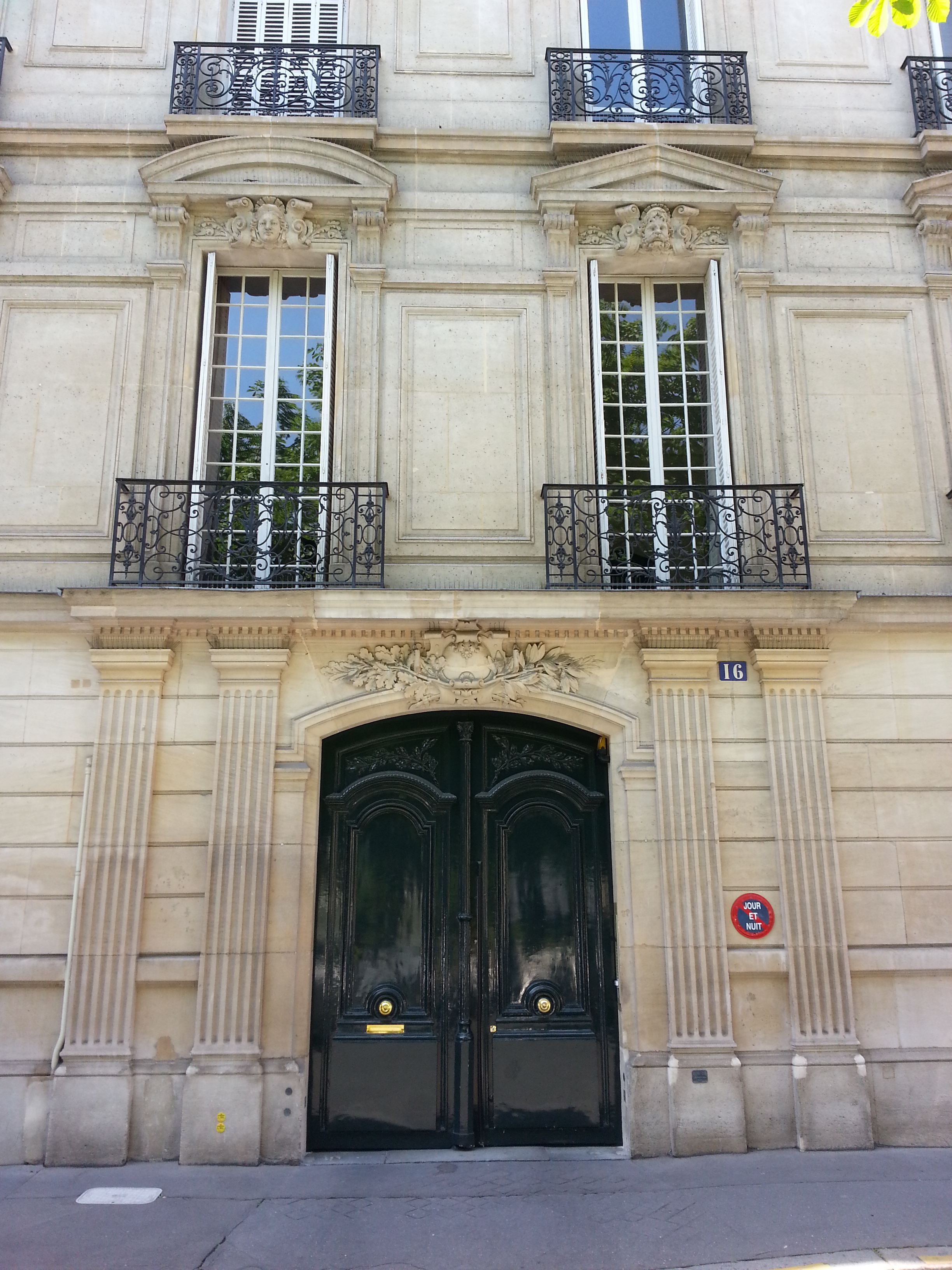 Entrée du 16 place des États-Unis dans le 16e arrondissement de Paris.